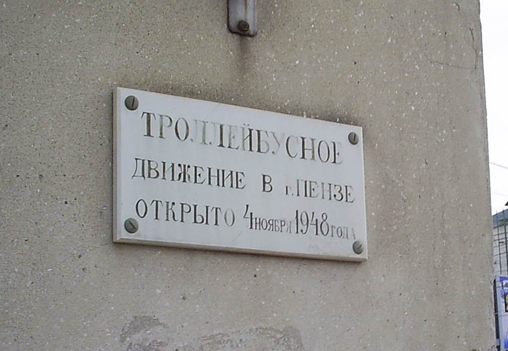 Мемориальная доска на здании Управления транспорта и связи г. Пензы